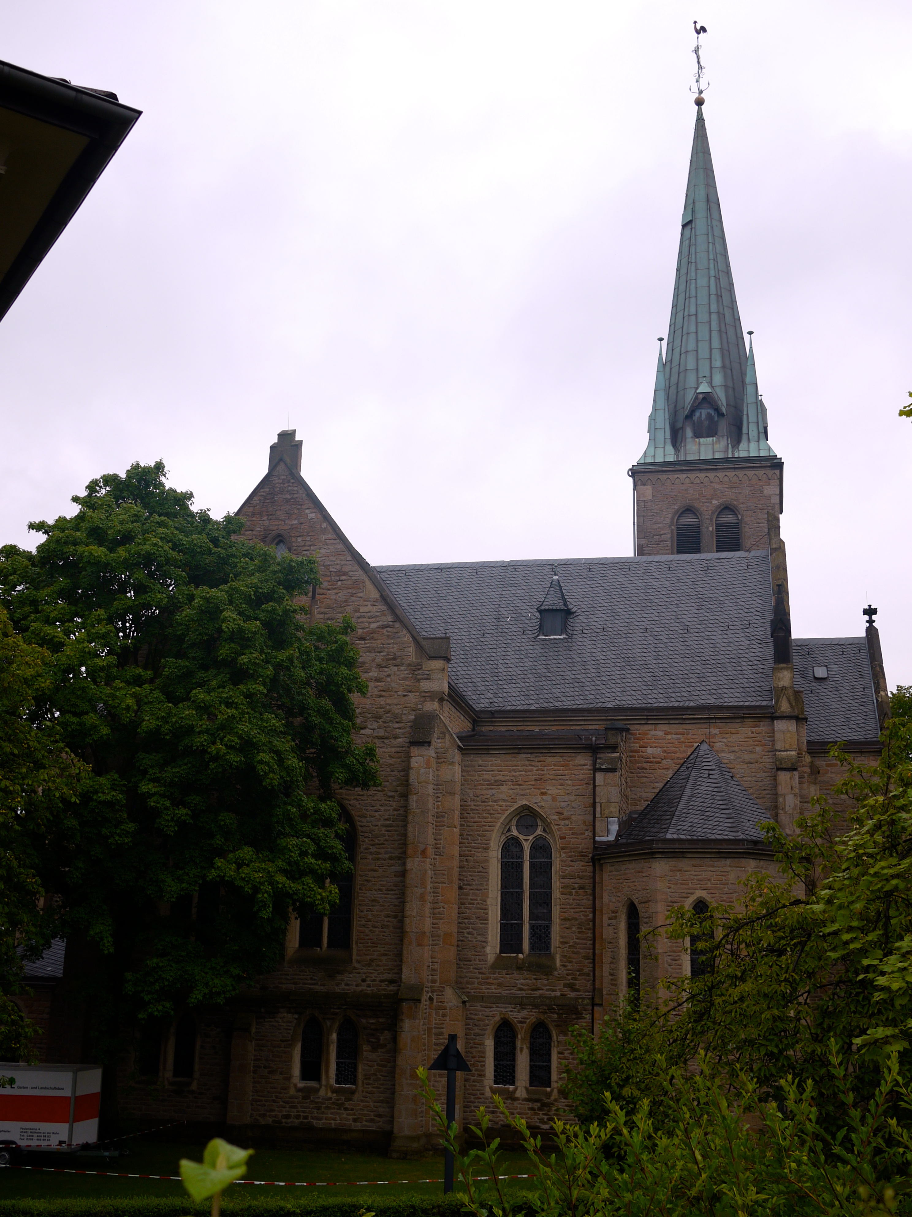 Evangelische Kirche an der Wilhelminenstraße, Mülheim an der Ruhr, Südansicht